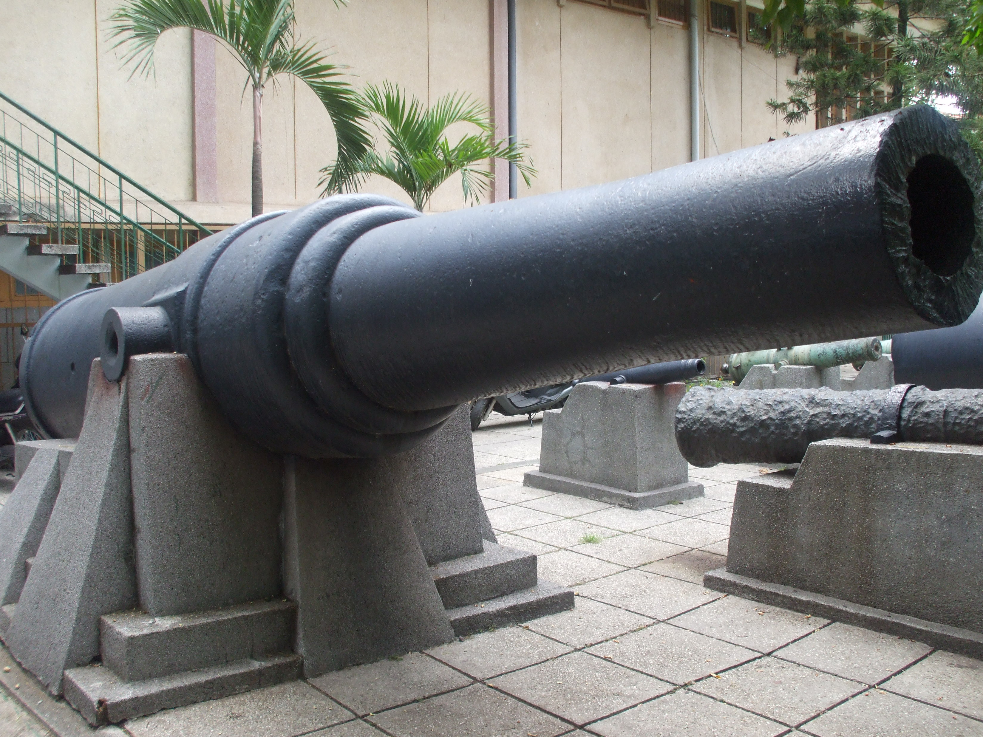 Đại bác Pháp (được đúc năm 1868) dùng để đánh nhau với quân đội nhà Nguyễn trong lịch sử Việt Nam. Hiện vật đang được trưng bày tại Bảo tàng Lịch sử Việt Nam - Thành phố Hồ Chí Minh.